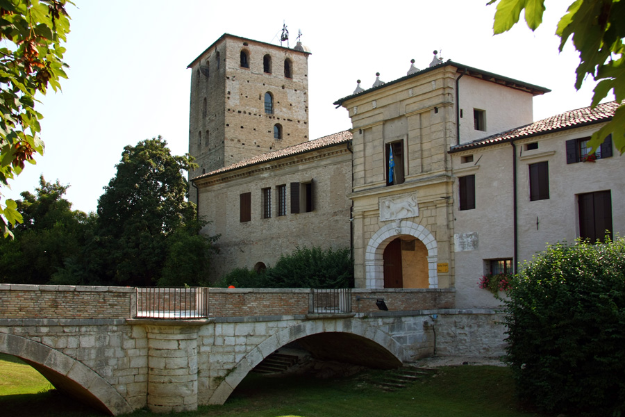 Antico ponte sul Livenza e porta di accesso al borgo di Portobuffolé (TV)